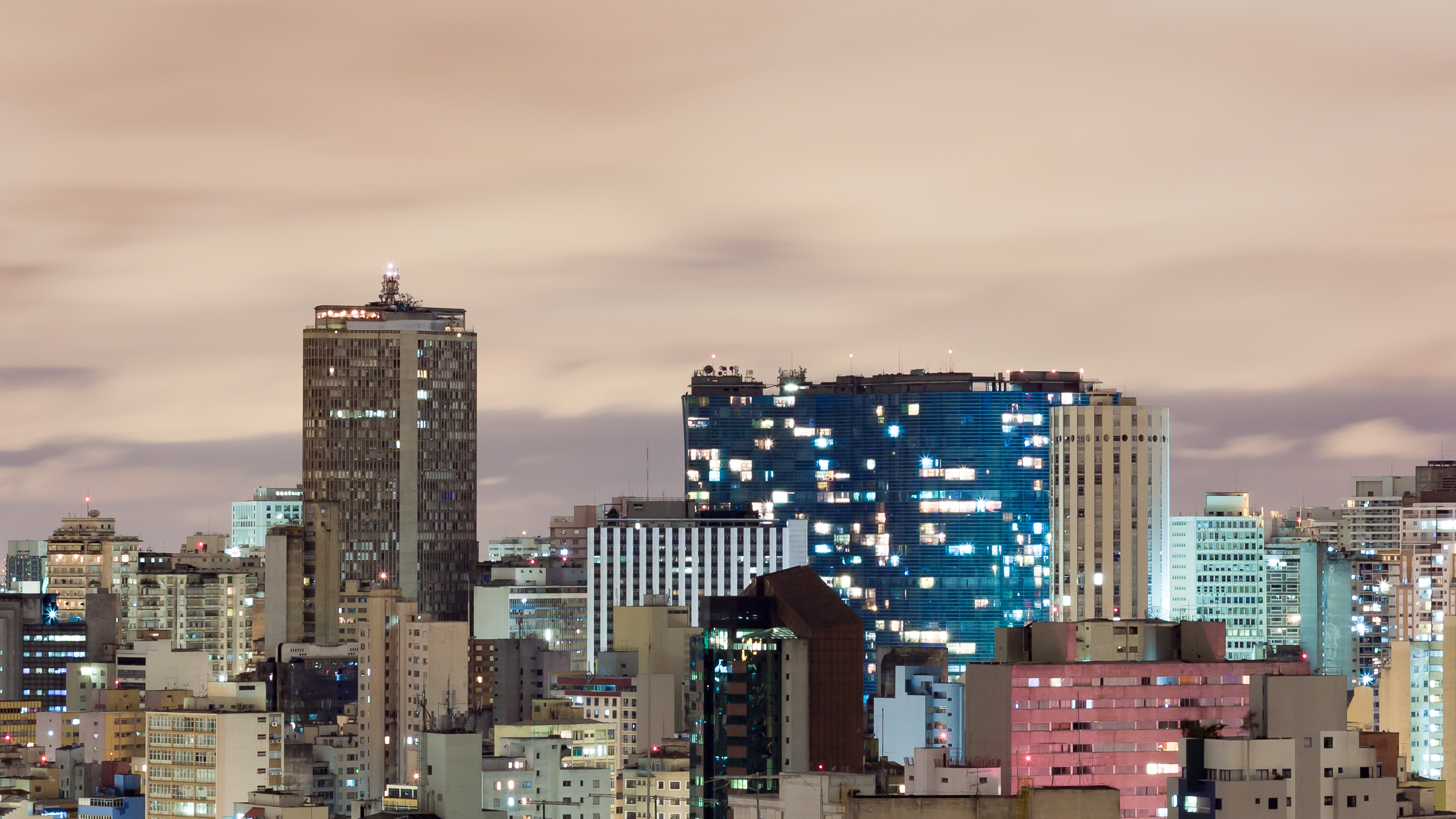 Visão noturna dos edifícios Terraço Itália e Copan respectivamente.